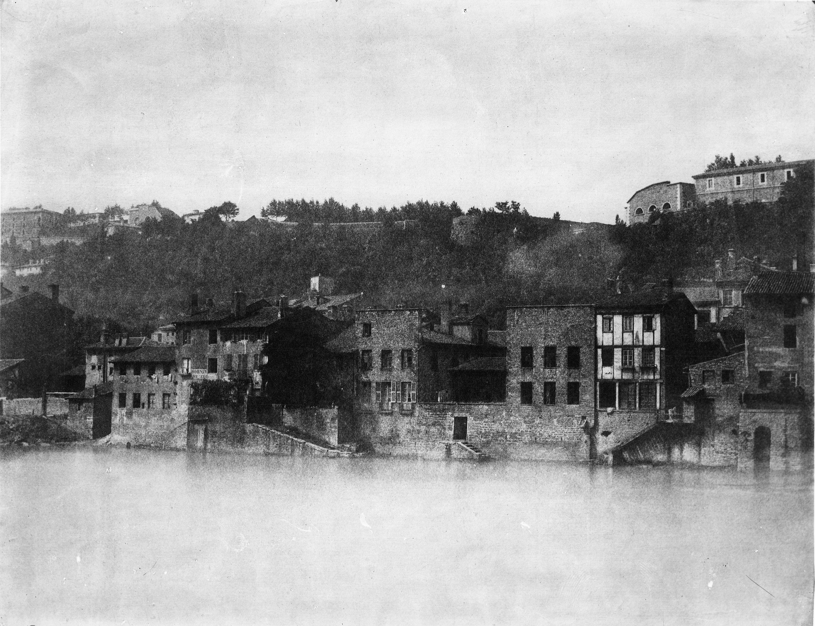 Vue du quai de Vaise, du fort Loyasse et du fort de Vaise, en 1852